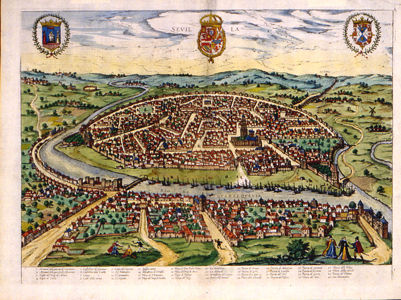 Sevilla en el siglo XVI. Entonces era una potencia comercial de primer orden y los galeones venían de las Indias cargados de riquezas. Estos barcos aparecen también en el dibujo.